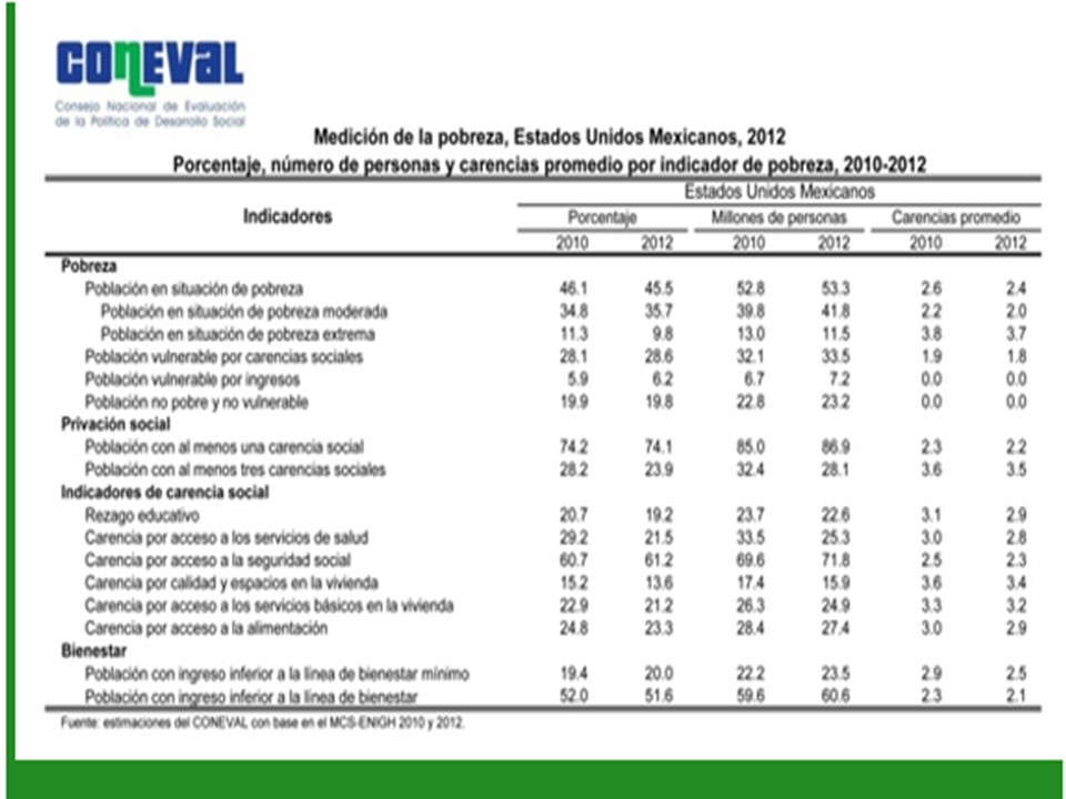 Tabla recuperada de la página oficial del CONEVAL.